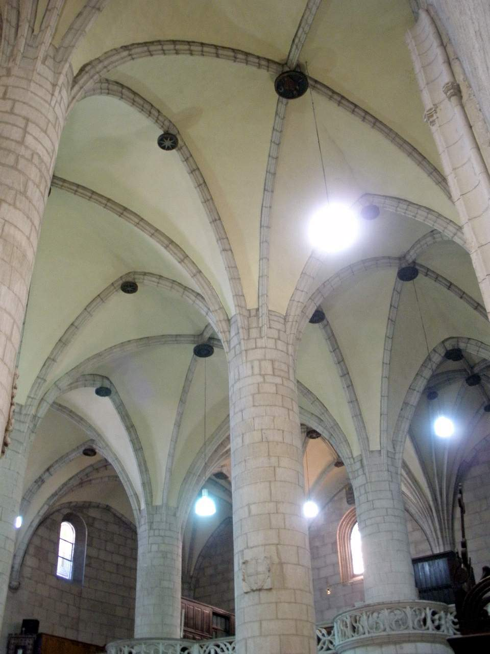 Vitoria - Iglesia de San Vicente Mártir